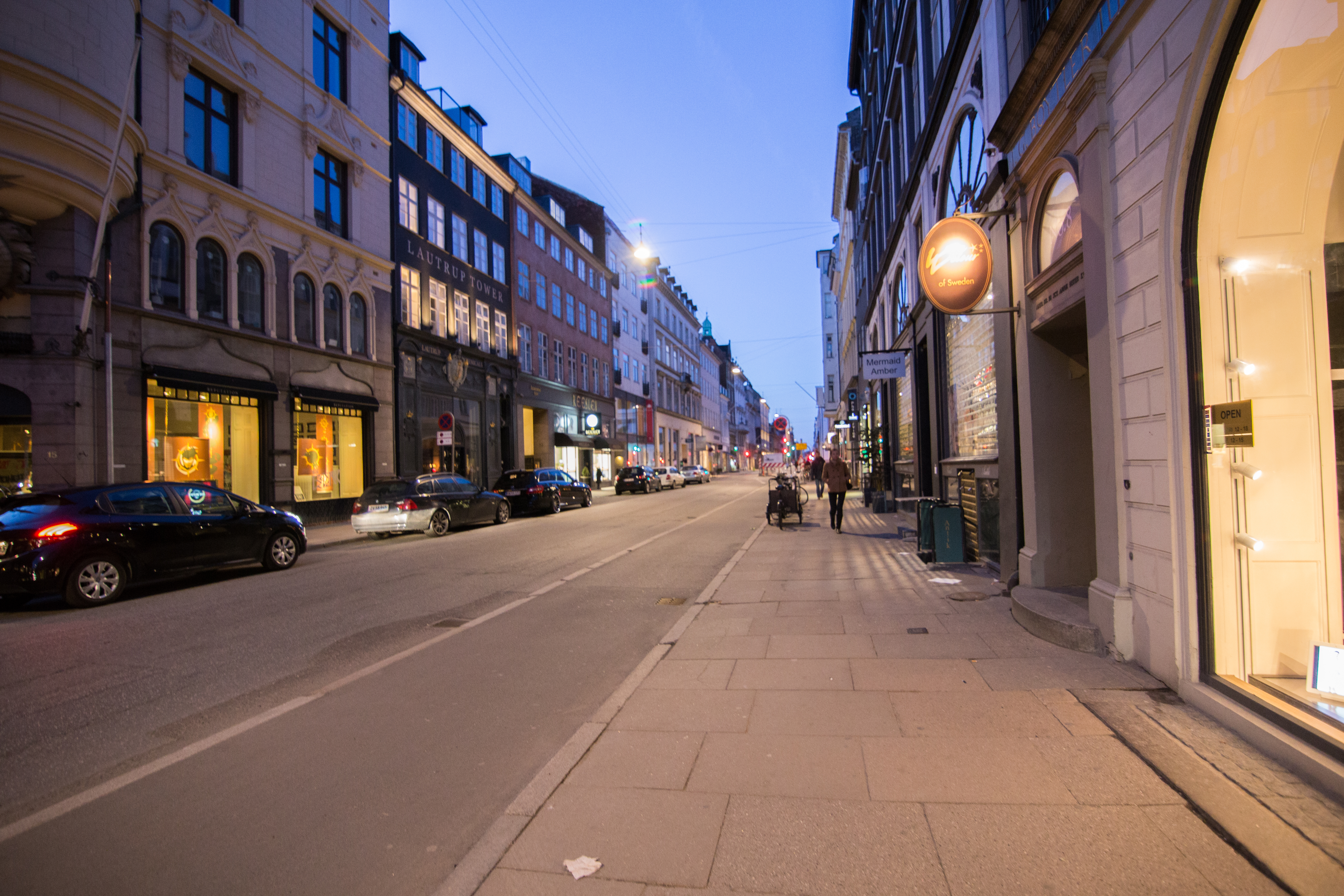 Bredgade in Copenhagen, Denmark